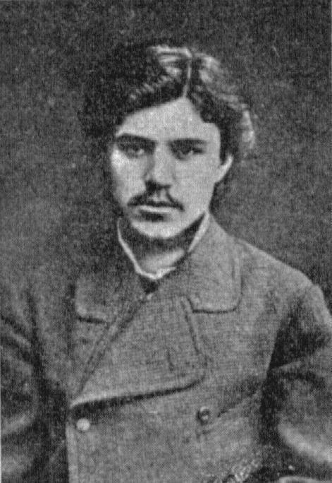 Студенческая фотография профессора Спижарного И. К.